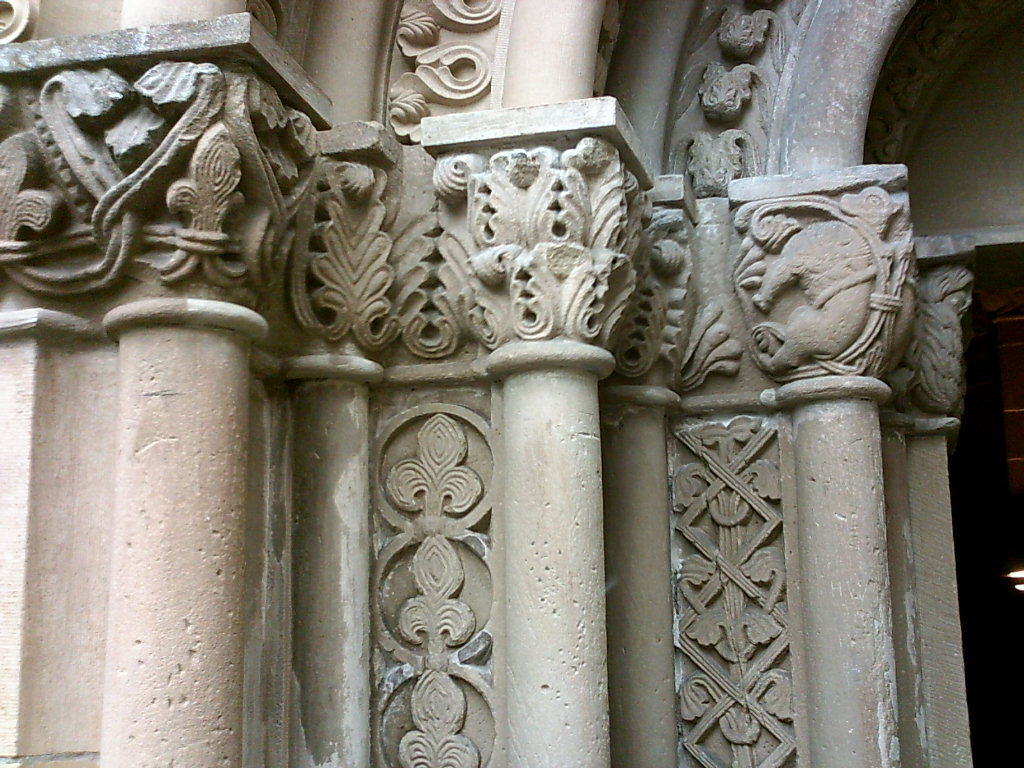 Detail des Türbogens der Walterichkapelle in Murrhardt